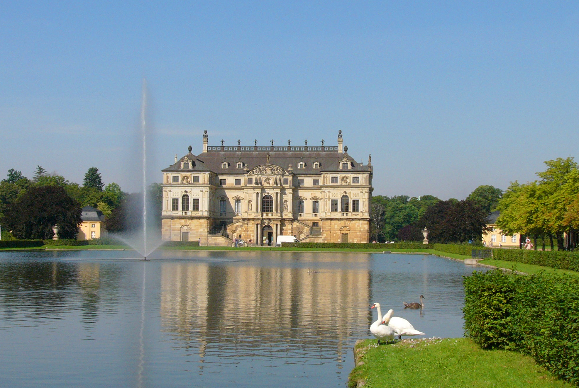 Palais im Großen Garten, Dresden, Germany